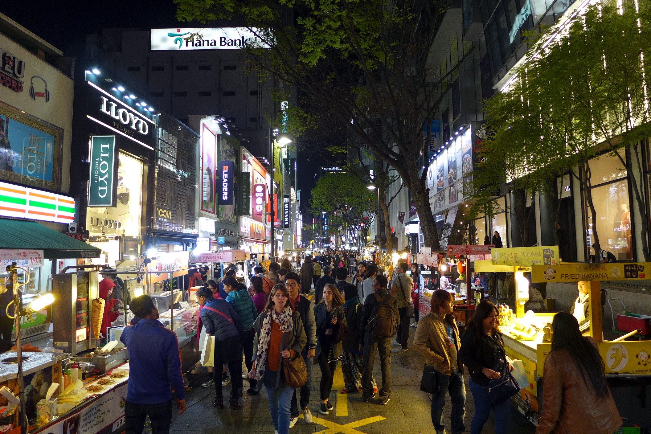 Myeong-dong Night view